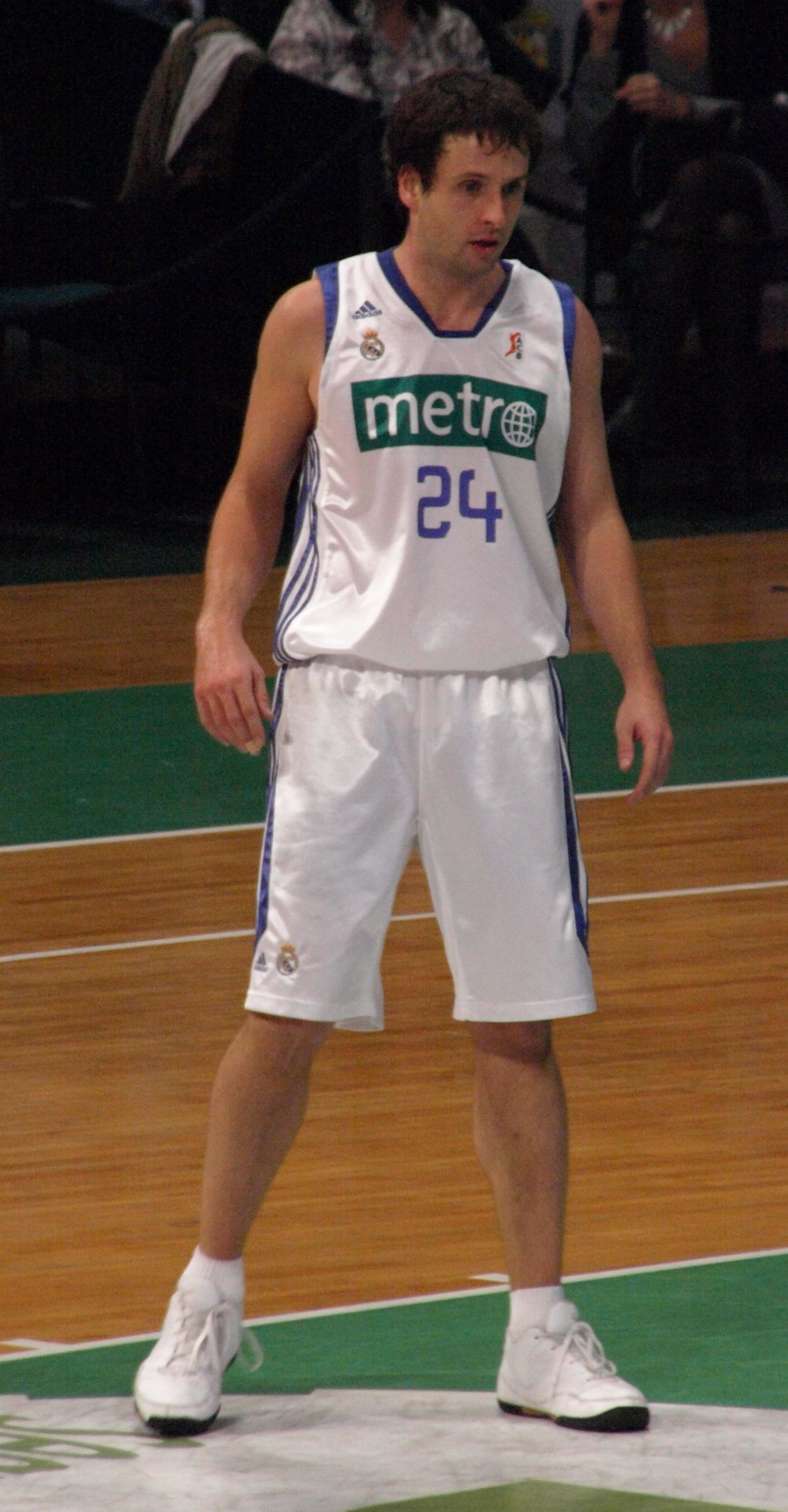 Raul López en el pabellón Olímpico de Badalona en noviembre de 2008